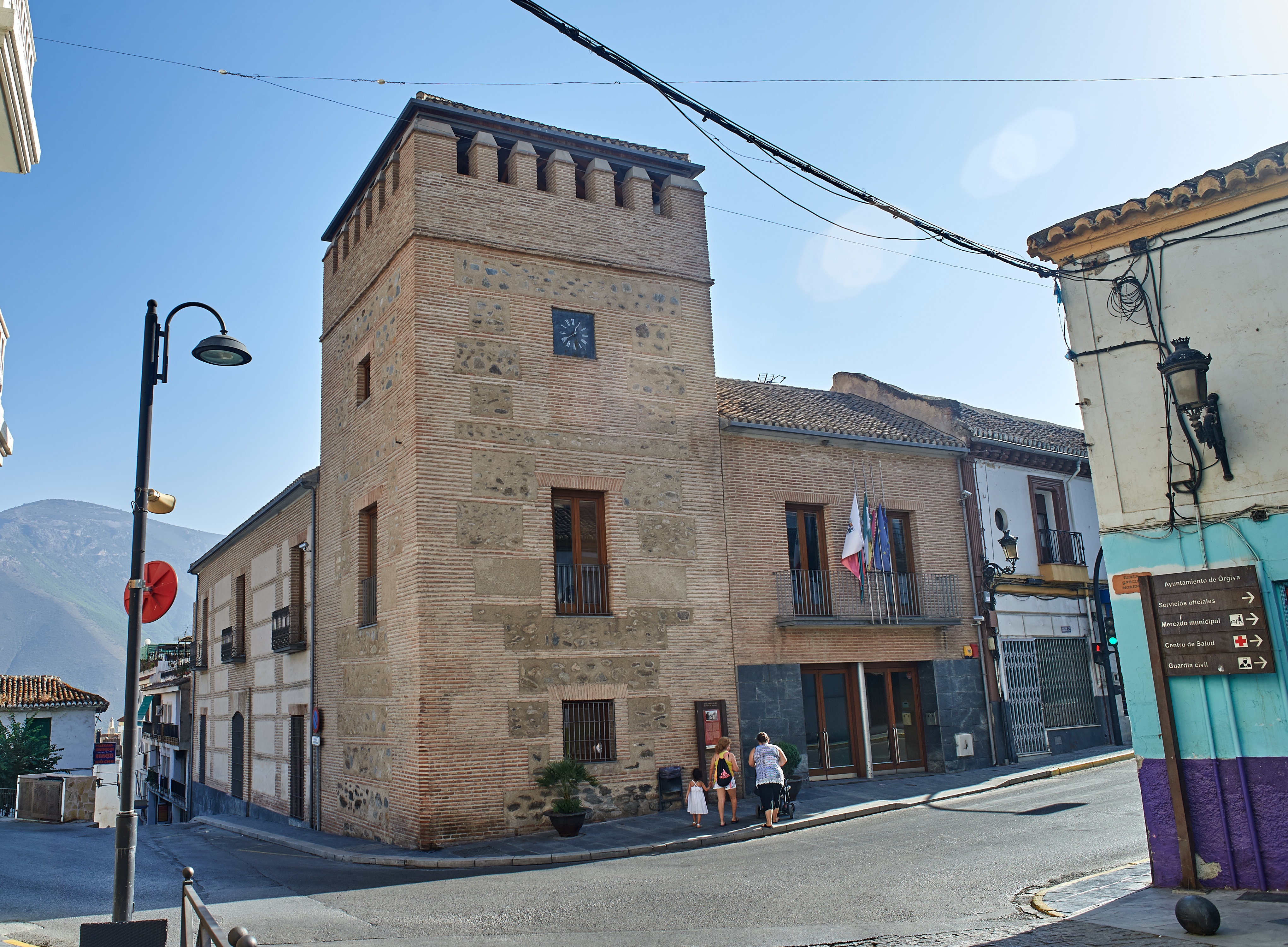 Casa palacio de los Condes de Sastago en Órgiva (Granada)